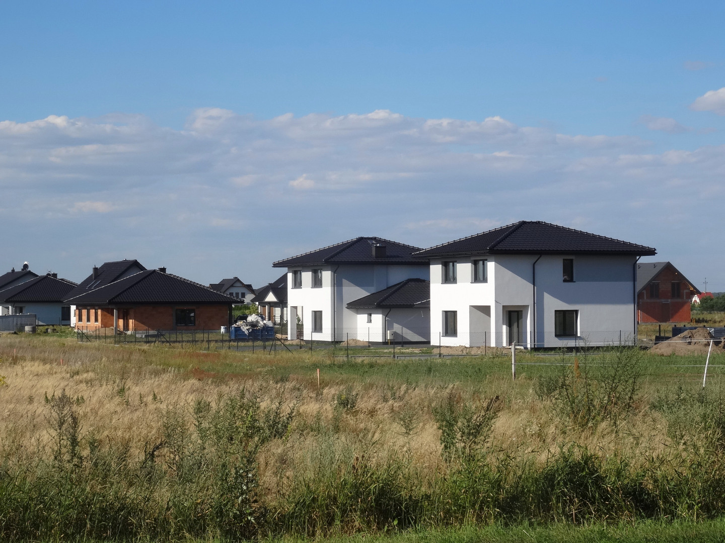 Łochowo, wieś w gminie Białe Błota, powiat bydgoski